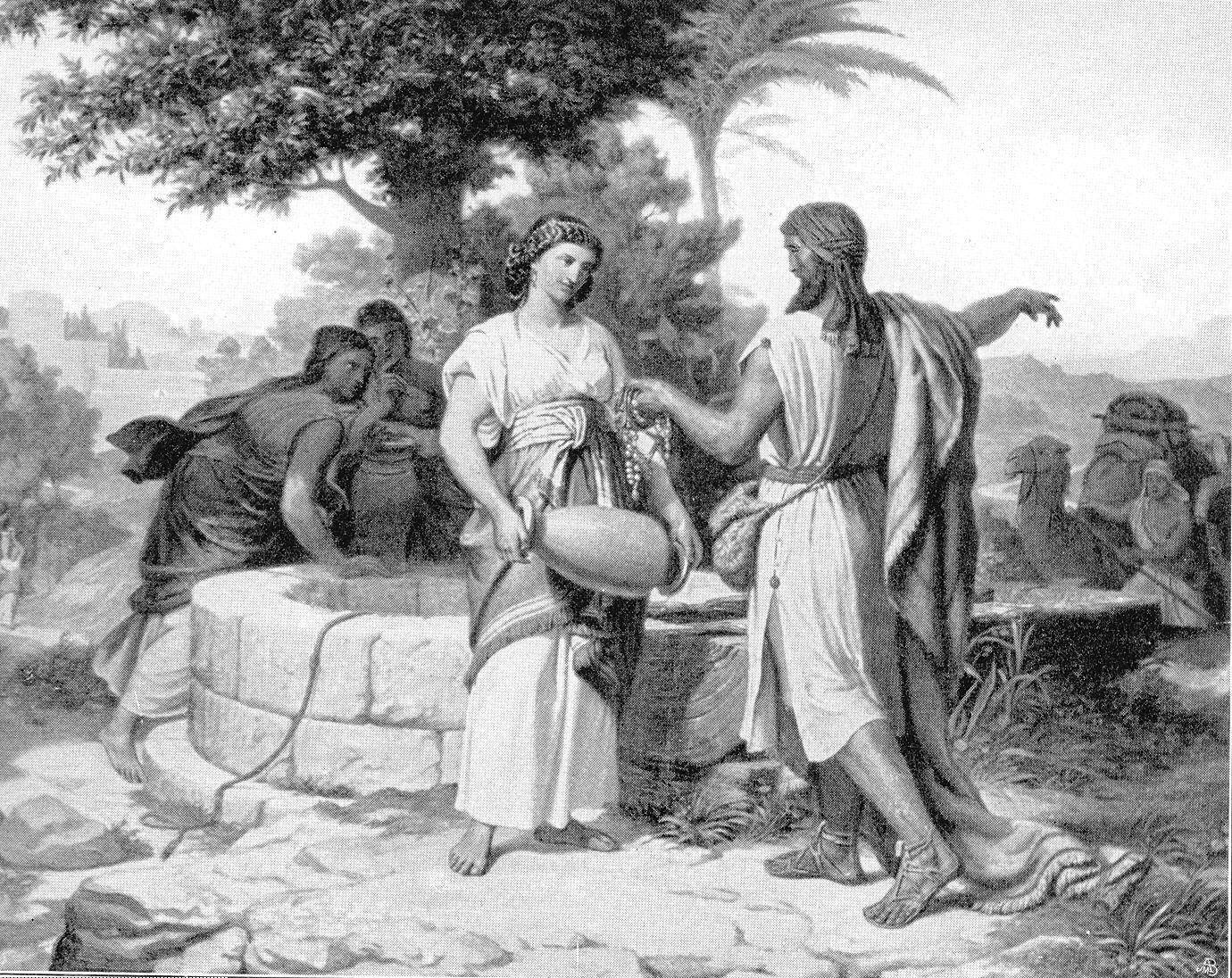 Josef Zenker: Rebekka am Brunnen. Der zitierte Band ist im Besitz von Benutzer Wietek